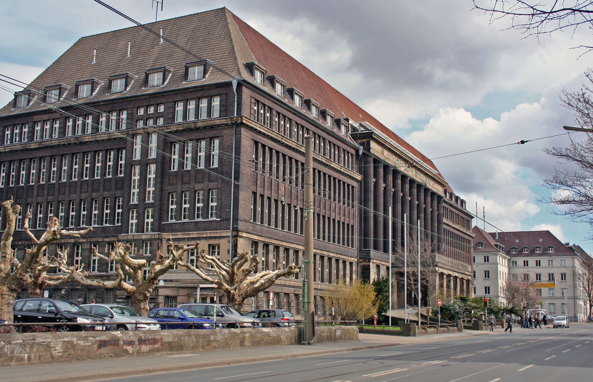 Union Verwaltung Rheinische Straße 173 This is a photograph of an architectural monument. 0327